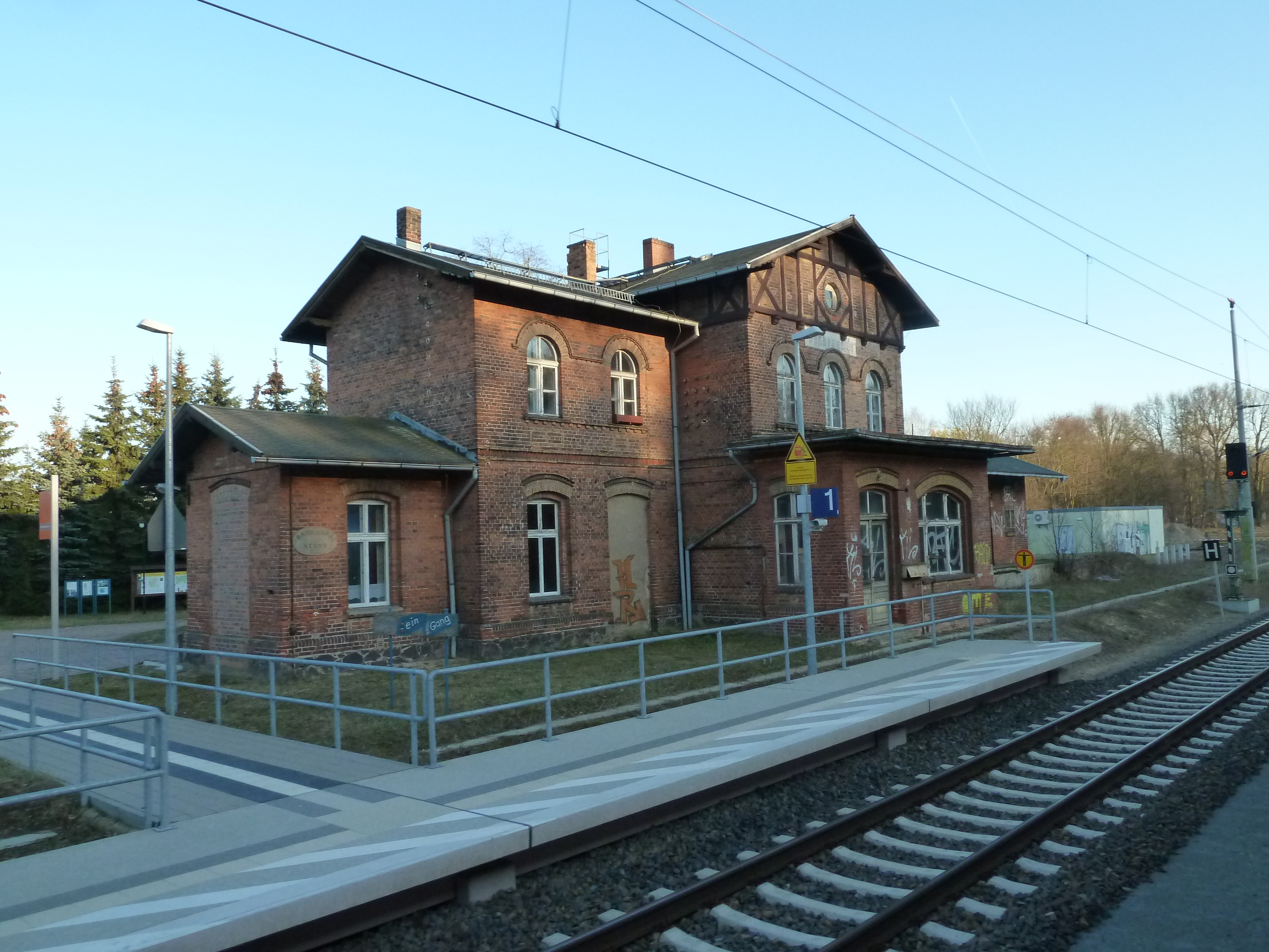 Denkmalgeschütztes Bahnhofsgebäude in Dannenwalde (Gransee)